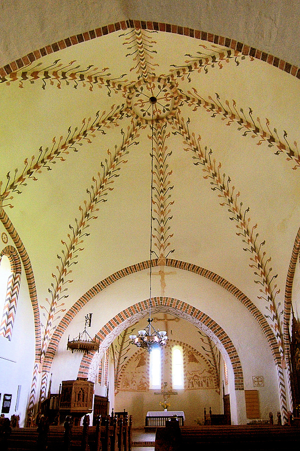 Kirche in Kavelstorf, Mecklenburg-Vorpommern